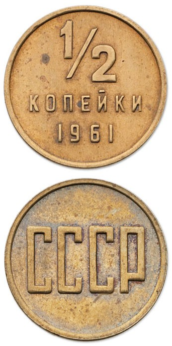 5 копеек 1961 г. СССР (пробный, невыпущен)